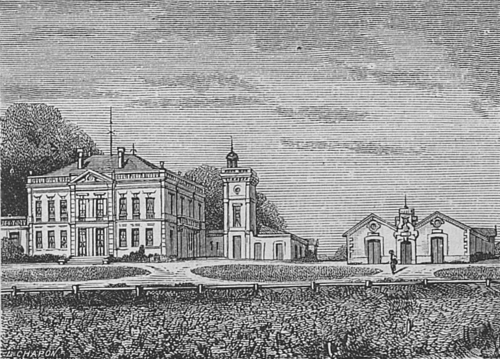 Illustration du Château Gruaud Larose dans l'ouvrage Bordeaux et ses vins (6ème édition) de Charles Cocks et Edouard Féret publié en 1893